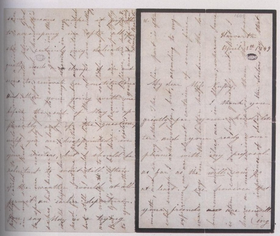 Lettre de Anne Brontë à Ellen Nussey